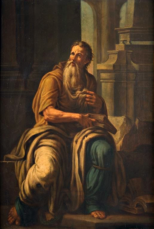 Archimede, ritratto seduto, regge un libro semichiuso nella mano sinistra